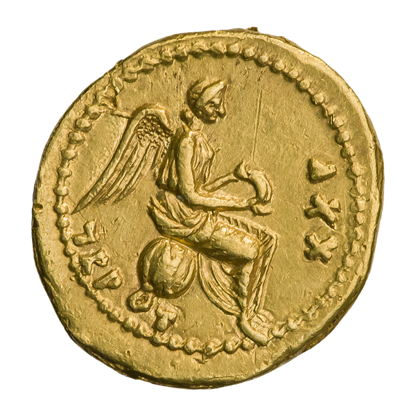 Золотой квинарий. Тиберий. Ок. 23—24 гг. (реверс). Надпись TR POT — XXV. Виктория (богиня победы) сидит на сфере, вправо; в руках — венок.